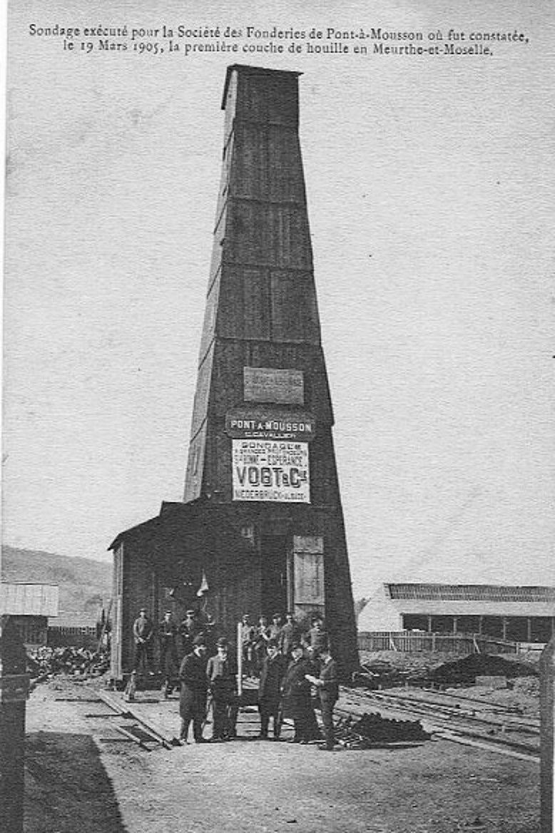 Une tour de Sondage de la société Joseph Vogt construite à Pont-à-Mousson.